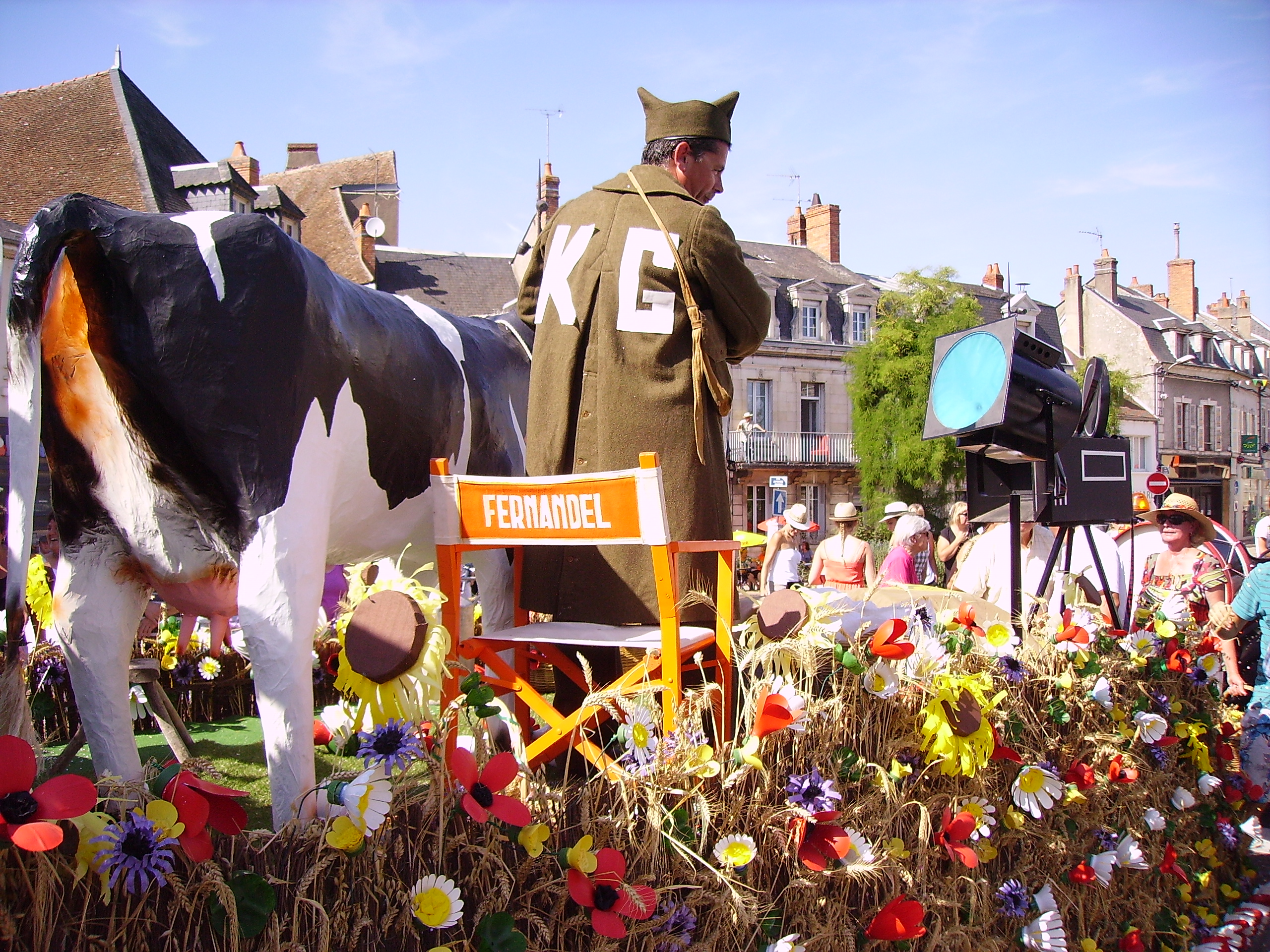 Char (confectionné en produits recyclés) inspiré du film La Vache et le Prisonnier d'Henri Verneuil. KG : initiales de Kriegsgefangener (prisonnier de guerre). Lors du défilé du comice agricole du canton de Cosne-Cours-sur-Loire le 30 août 2015. Au carrefour giratoire près de la mairie de Cosne-Cours-sur-Loire.